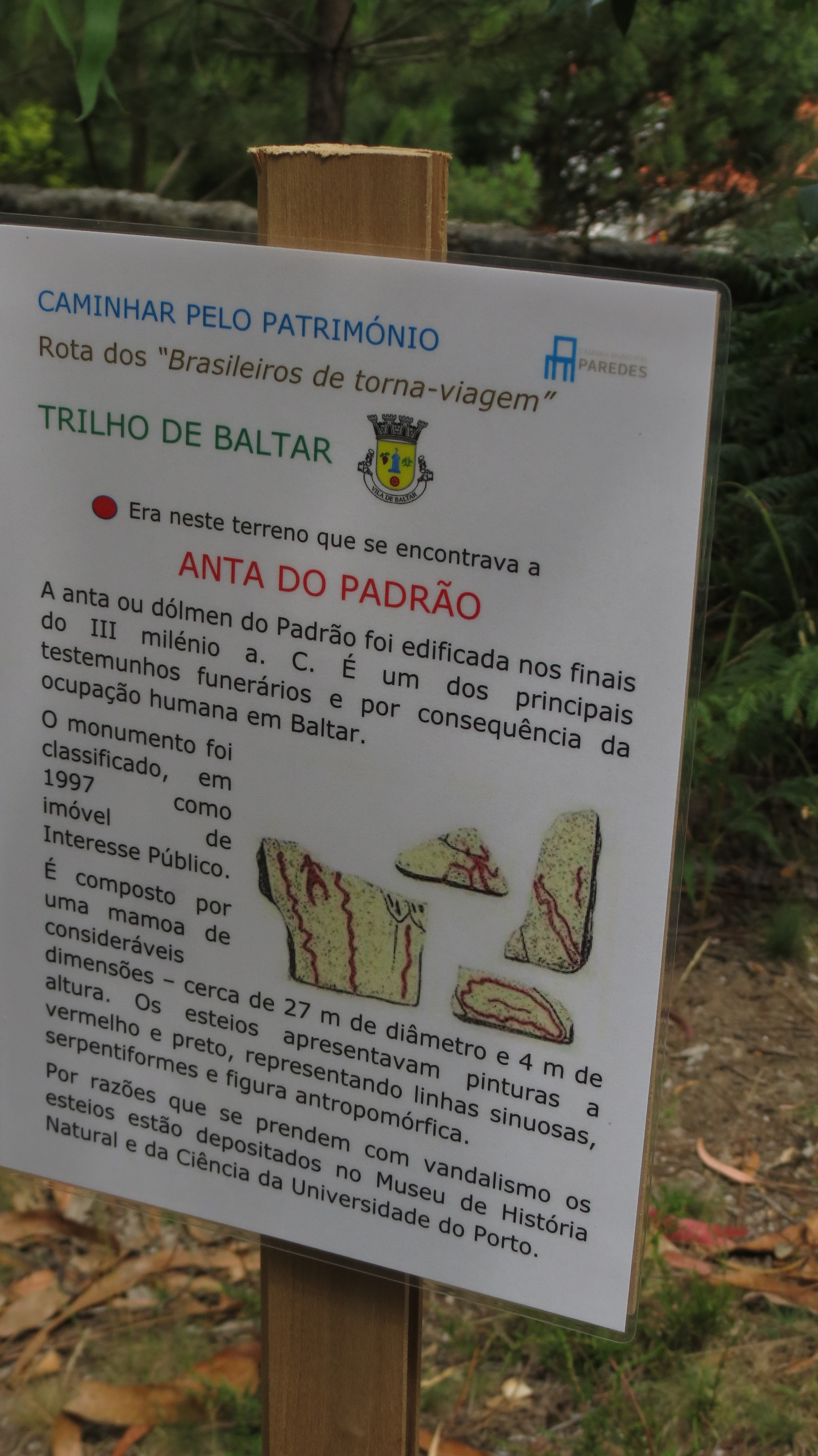 Placa de sinalização existente no local.